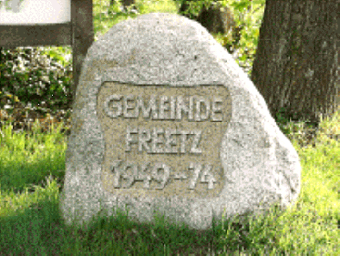 Der Gemeindestein befindet sich neben dem alten Spritzenhaus an der Dorfstraße in Freetz.